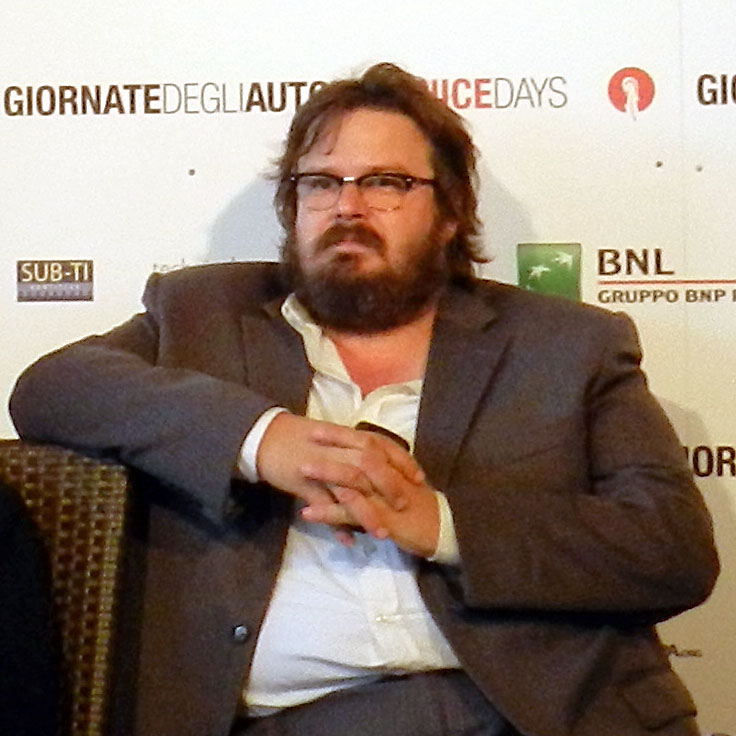 l'attore italiano Giuseppe Battiston alla presentazione del film Io sono Li al 68° Festival del Cinema di Venezia, 2011.